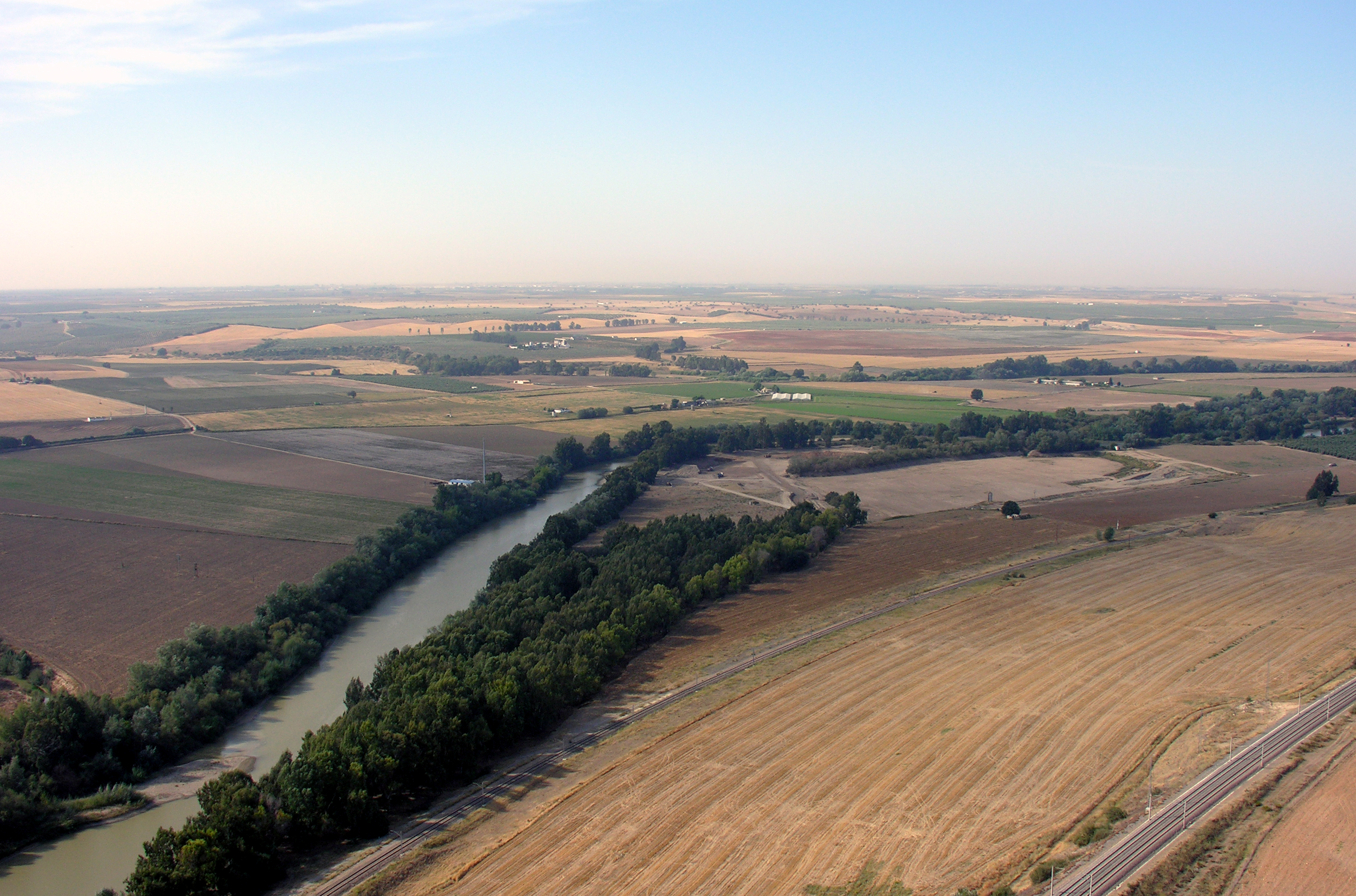 Río Guadalquivir a su paso por Almodovar del Río (Córdoba)